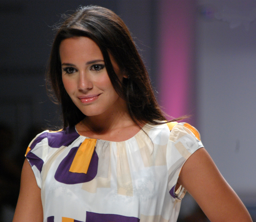 Juliana Knust @ Vivo Park Fashion.